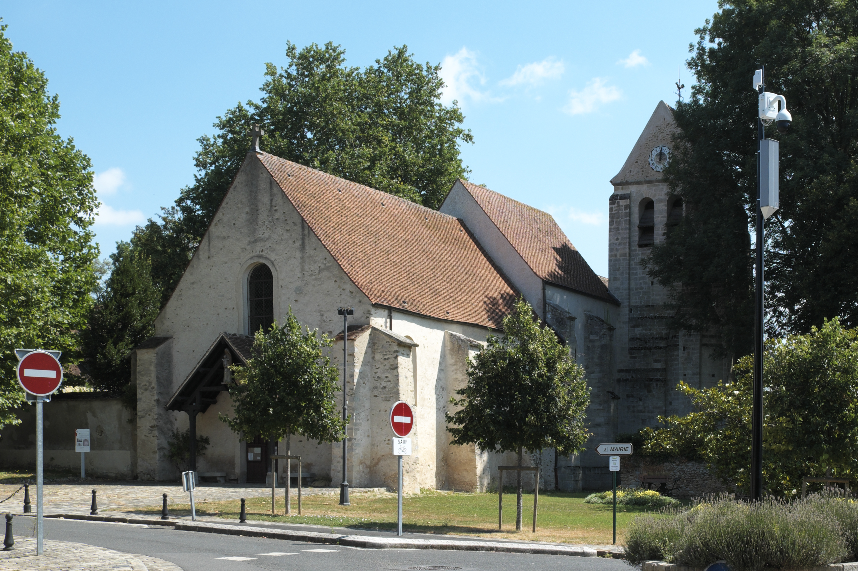 Katholische Pfarrkirche Saint-Julien-de-Brioude in Marolles-en-Brie im Département Val-de-Marne (Île-de-France/Frankreich)